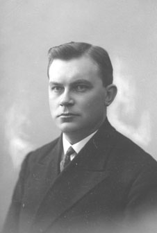 Elmar Emil Leppik, eesti fütopatoloog